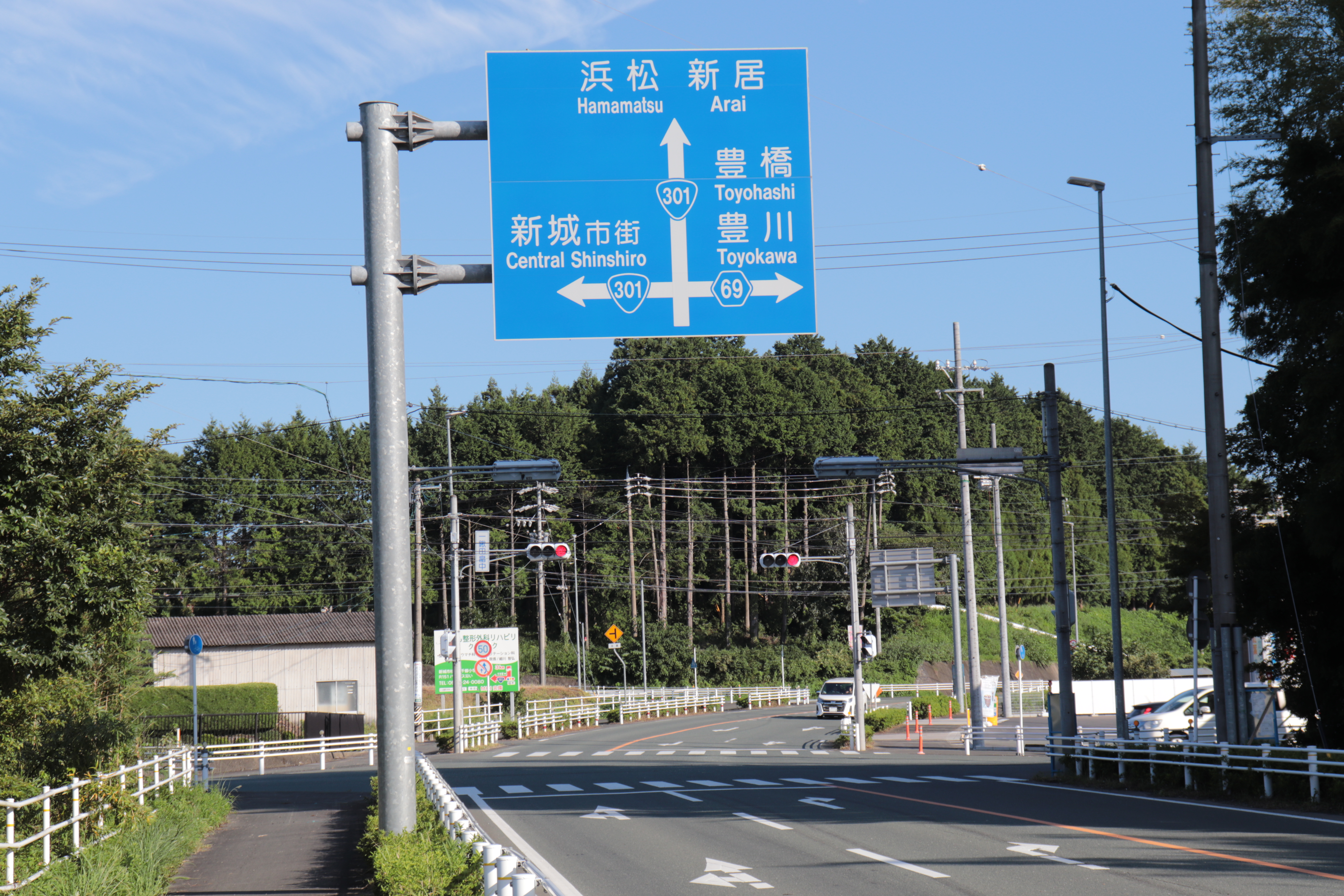 国道301号、愛知県道69号豊橋乗本線と愛知県道392号新城引佐線の「一鍬田畠中交差点」交差点、愛知県新城市一鍬田にて Canon EOS Kiss X9